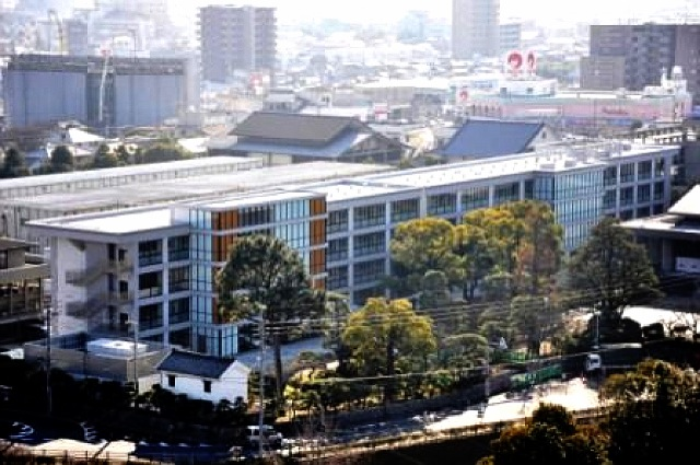 丸亀城から望む丸亀高校